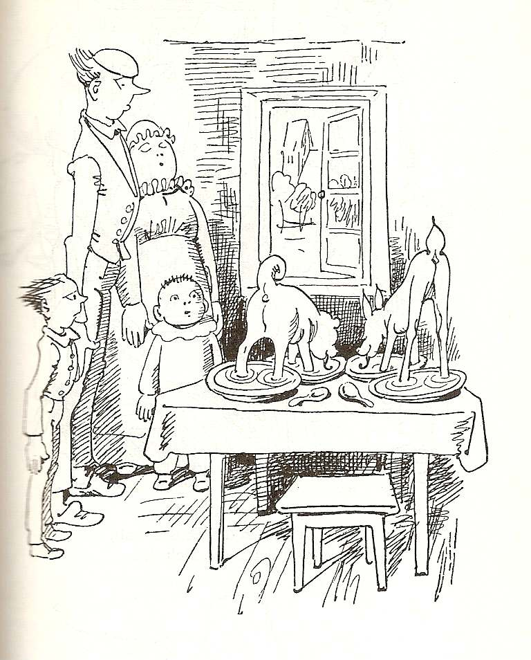 Plisch und Plum, zweites Kapitel